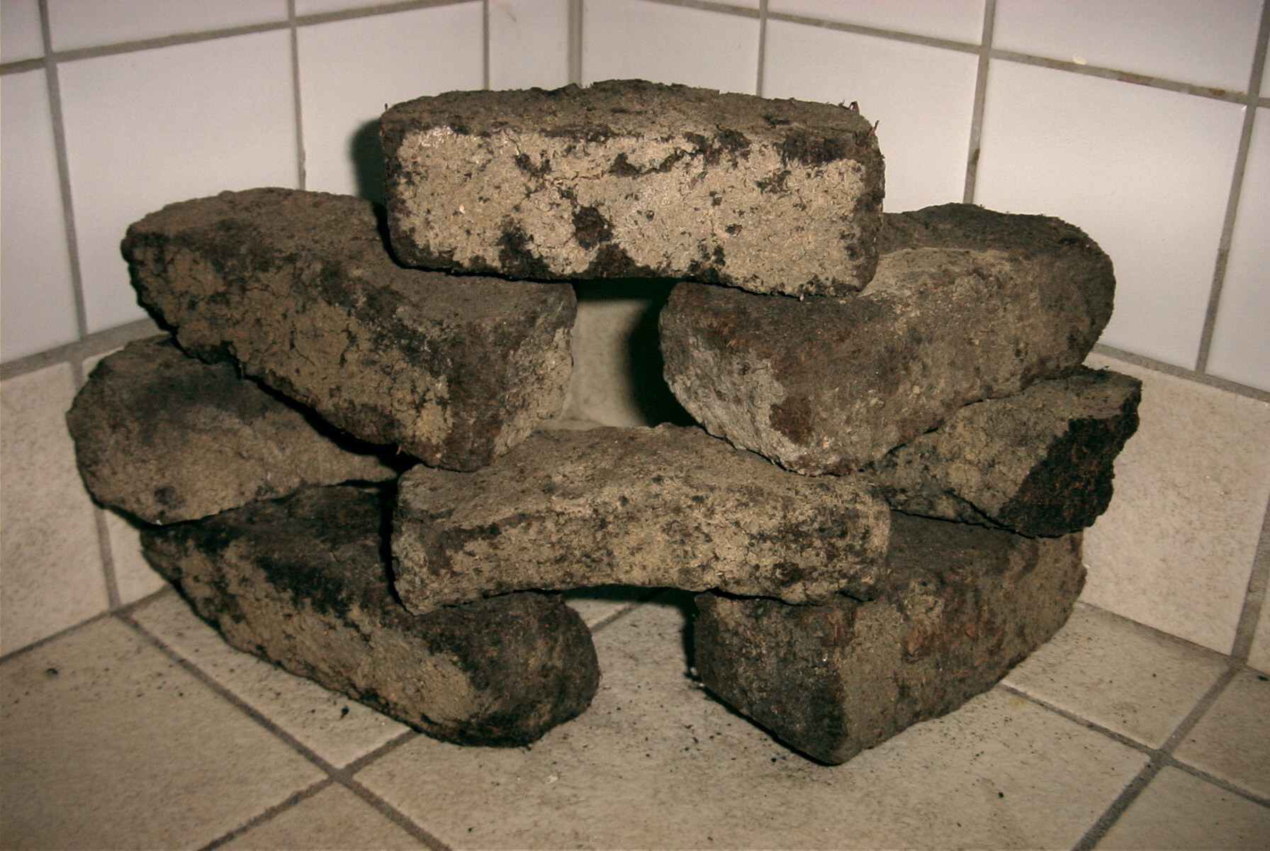 Torfstücke im Museum Gützkow